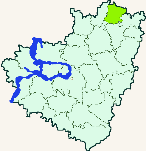 Samara Oblast map by Al Silonov Карта районов Самарской области